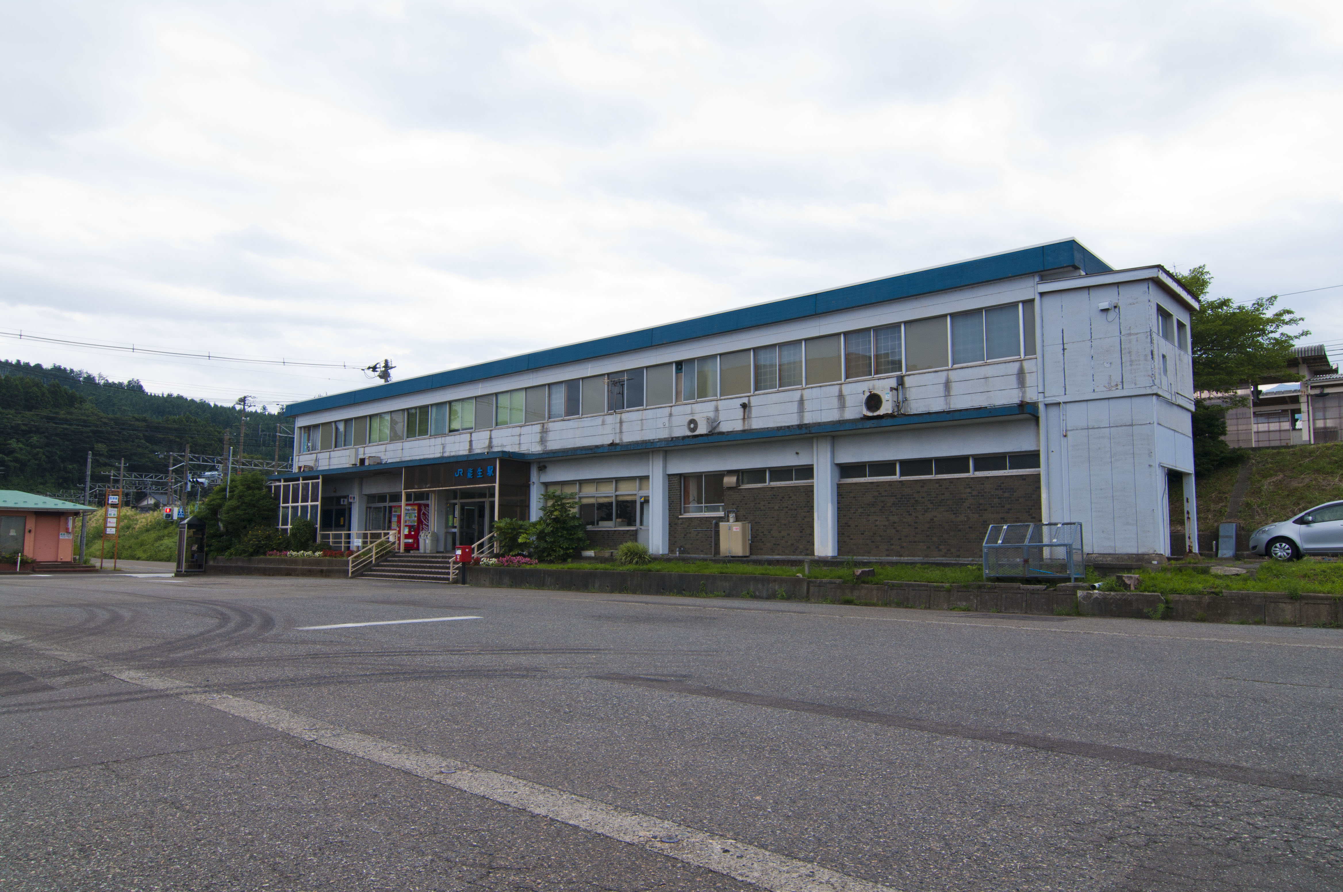 西日本旅客鉄道北陸本線能生駅駅舎